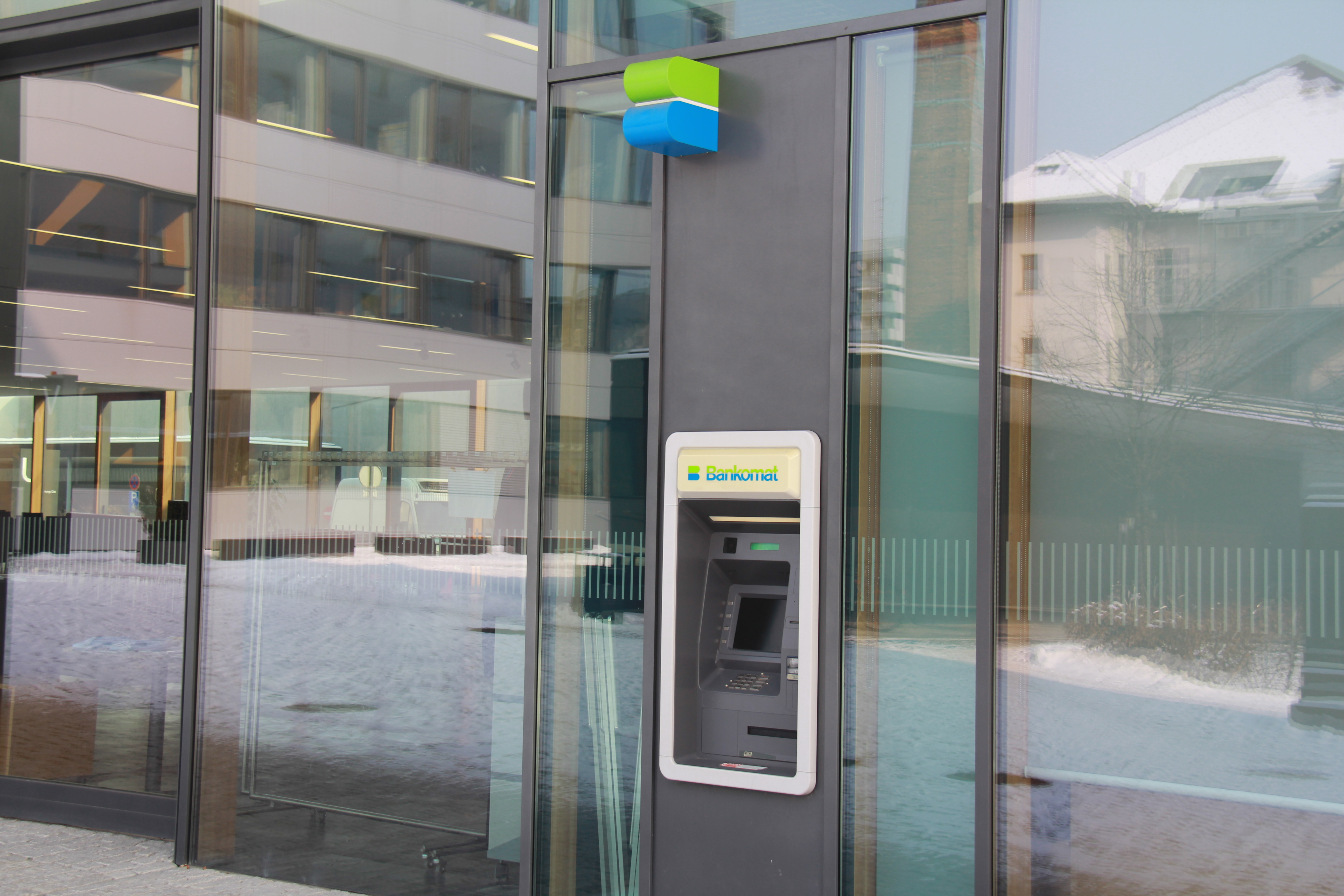 Fachhochschule Vorarlberg, Dornbirn die Bilder entstanden anlässlich des 1. Planungstreffens zur WikiCon 2012 Bankomat direkt am Hauptgebäude